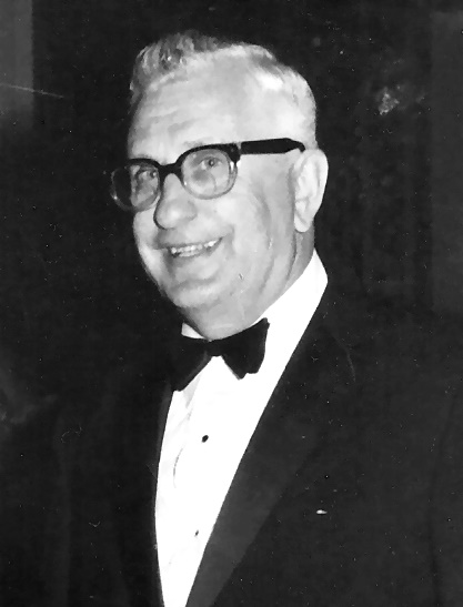 Juozas Giedraitis, Tautos fondo garbes pirmininkas